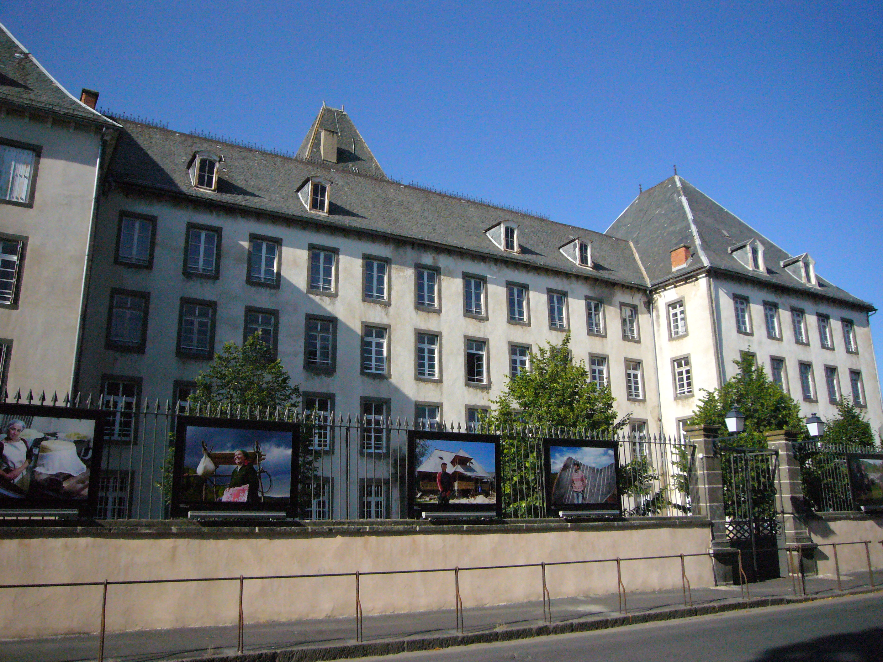 Lycée Notre-Dame de Saint-Flour (Cantal, France)